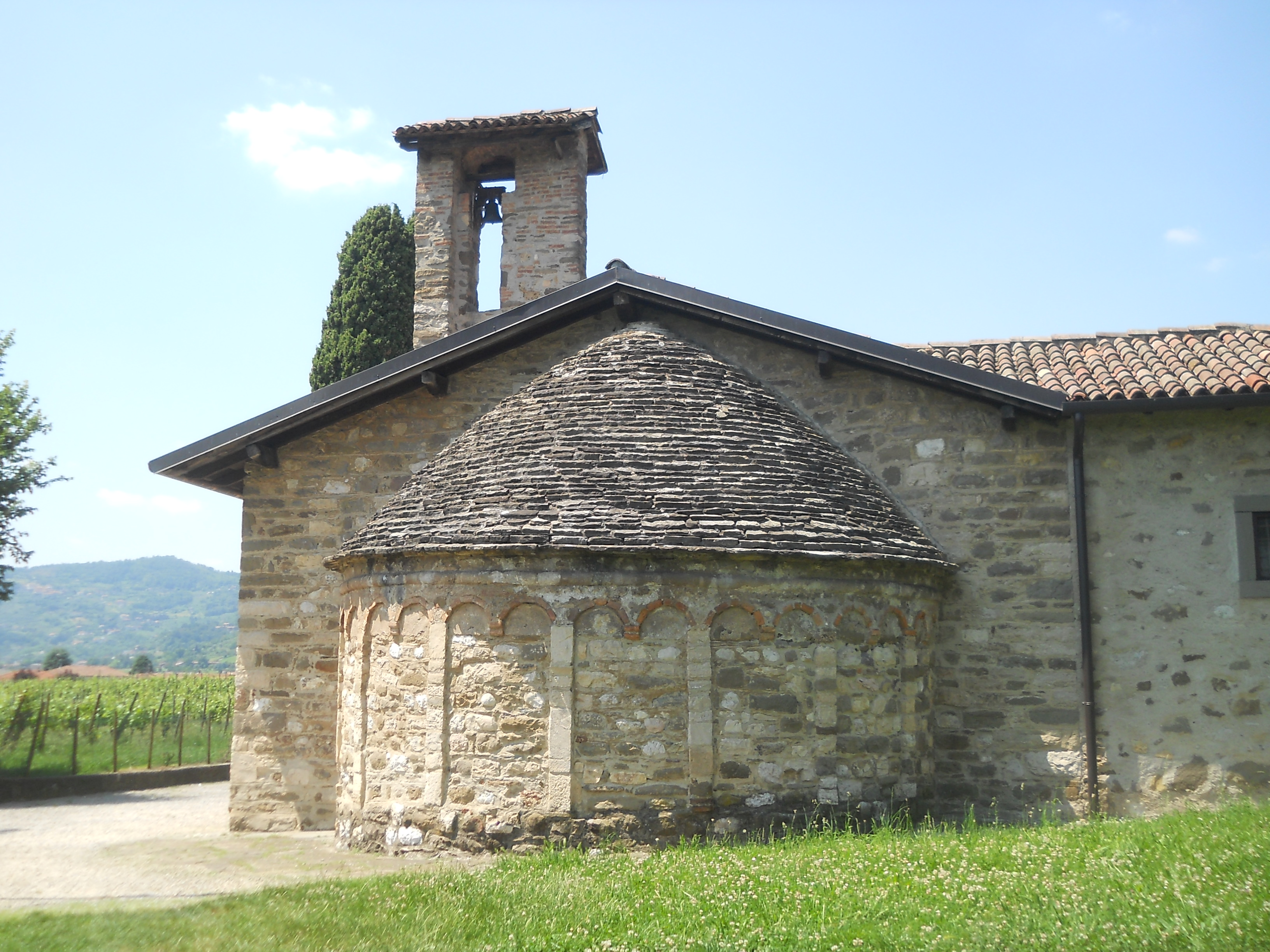 Abside della chiesa di Sant'Alessandro ad Agros a Villongo